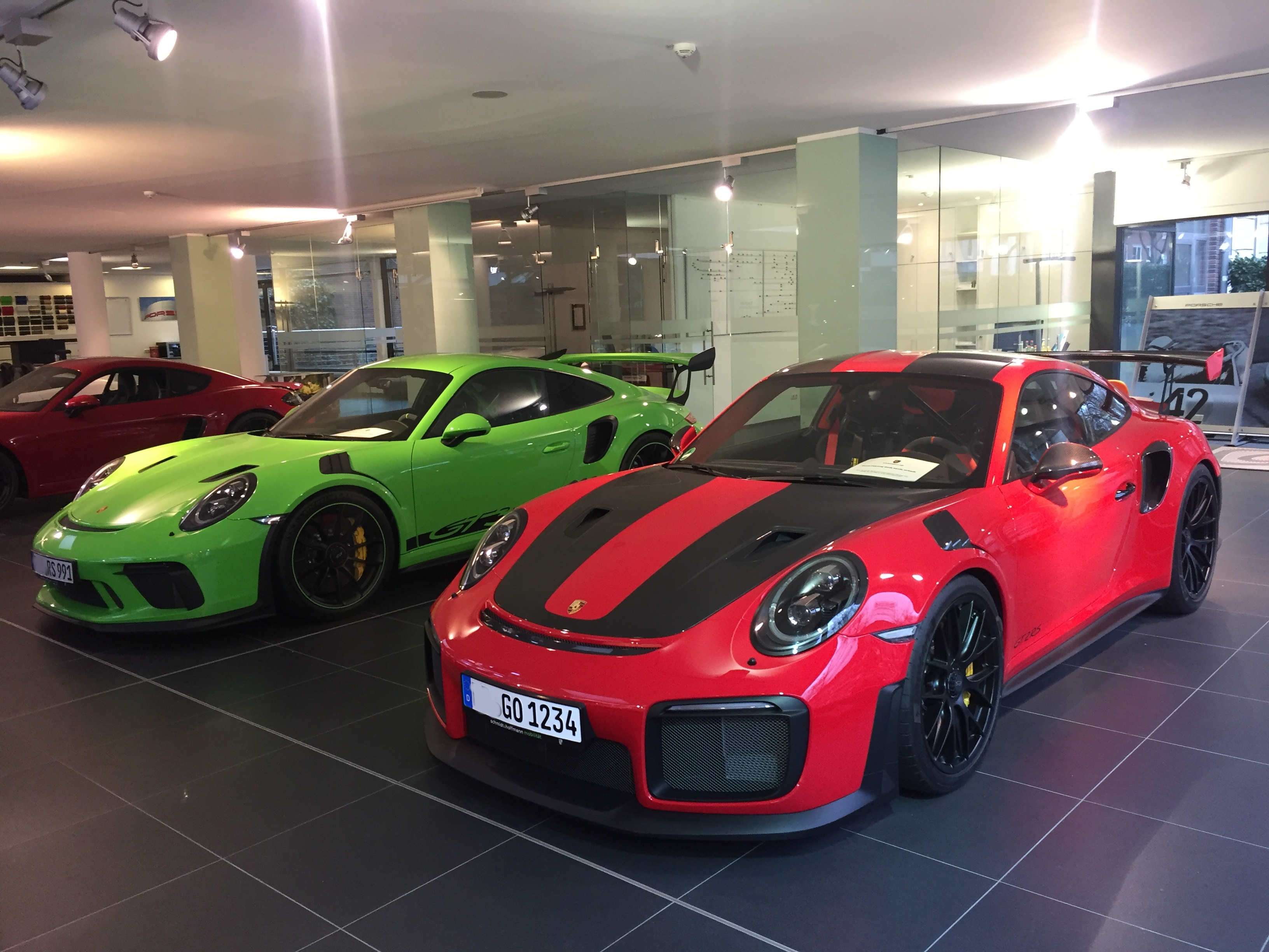 Porsche 991 GT2 RS & GT3 RS Frontansicht